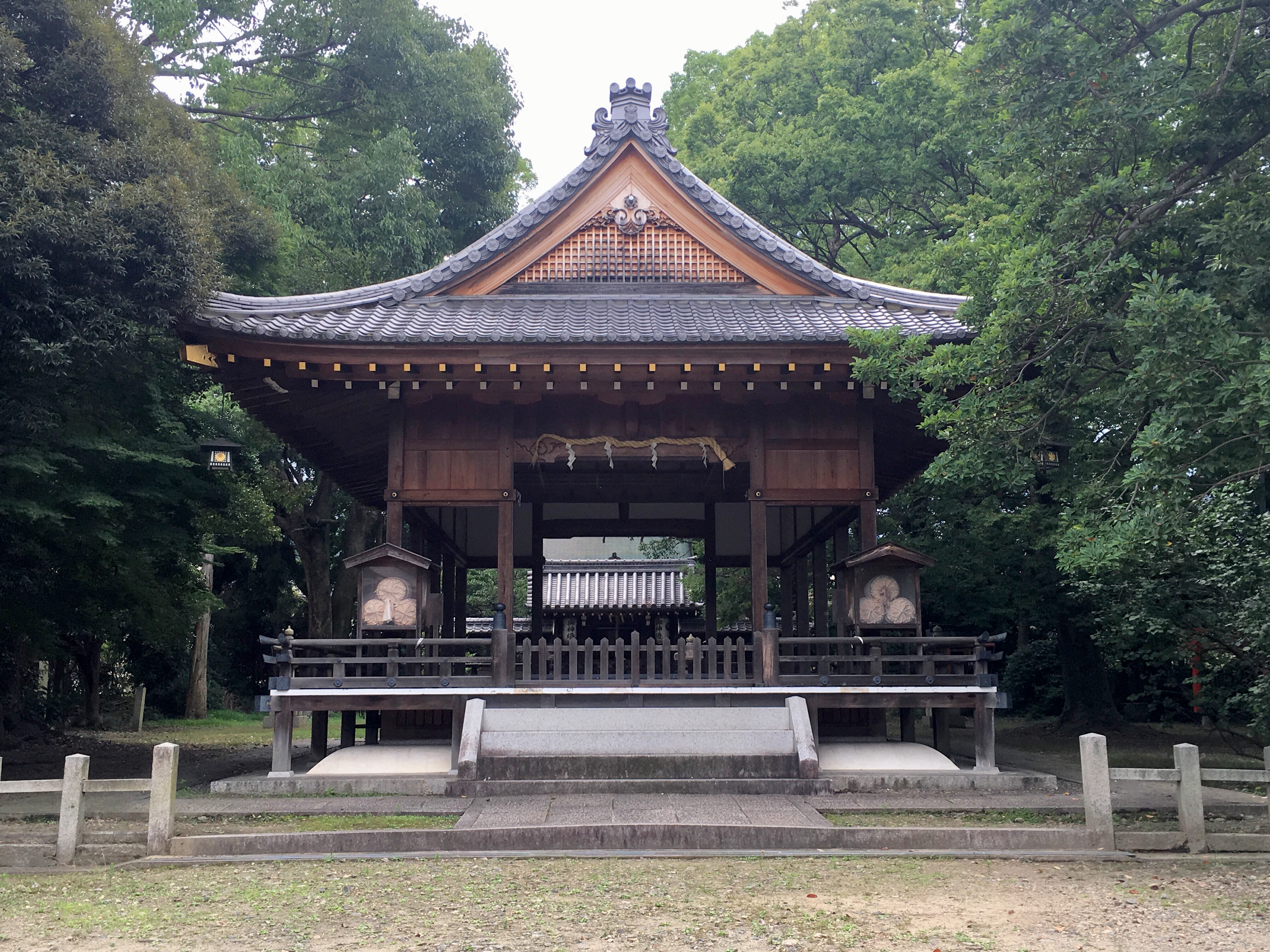 2019年7月、膳所神社で撮影。